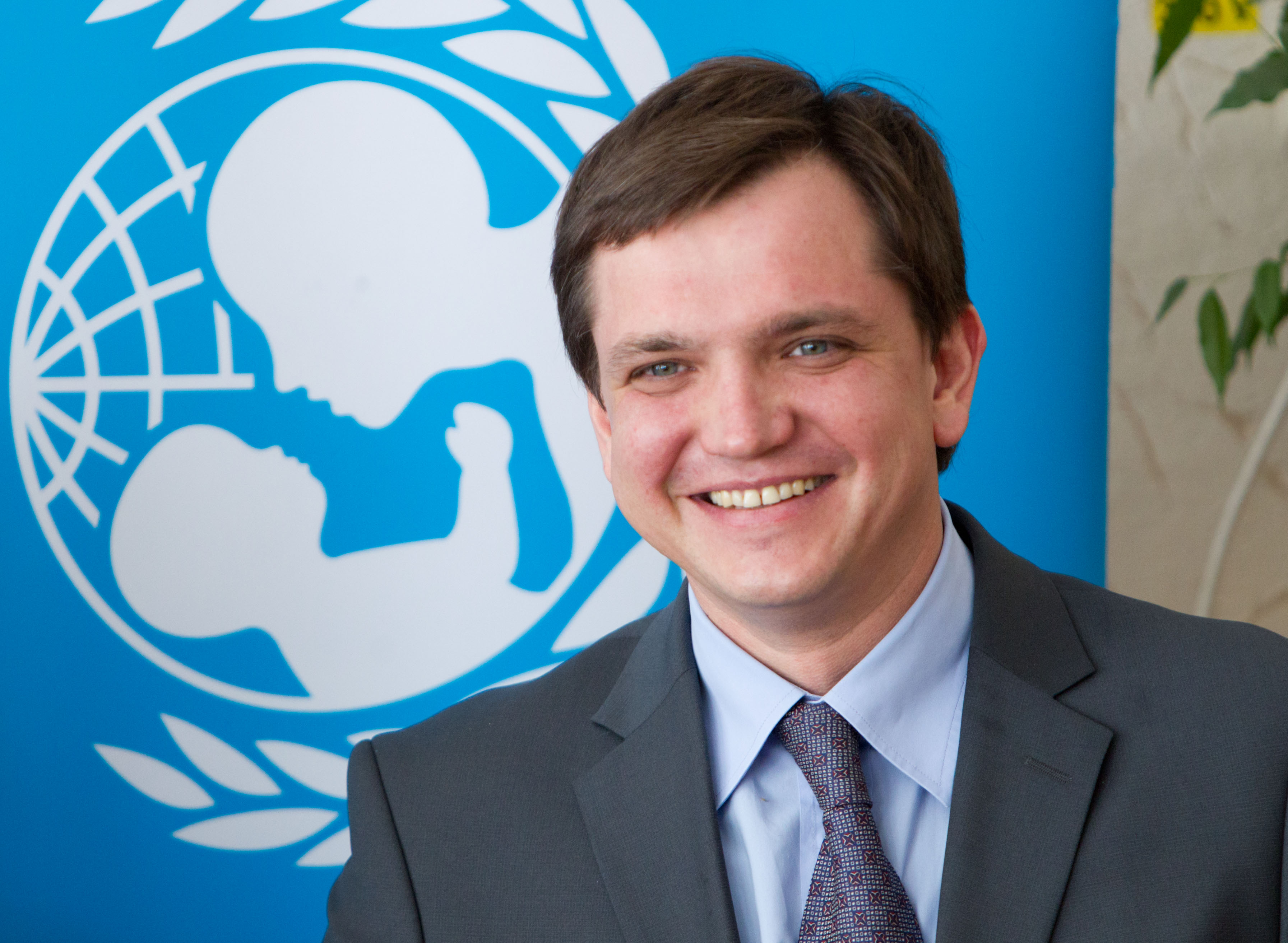 Юрій Павленко, Уповноваженим Президента України з прав дітей